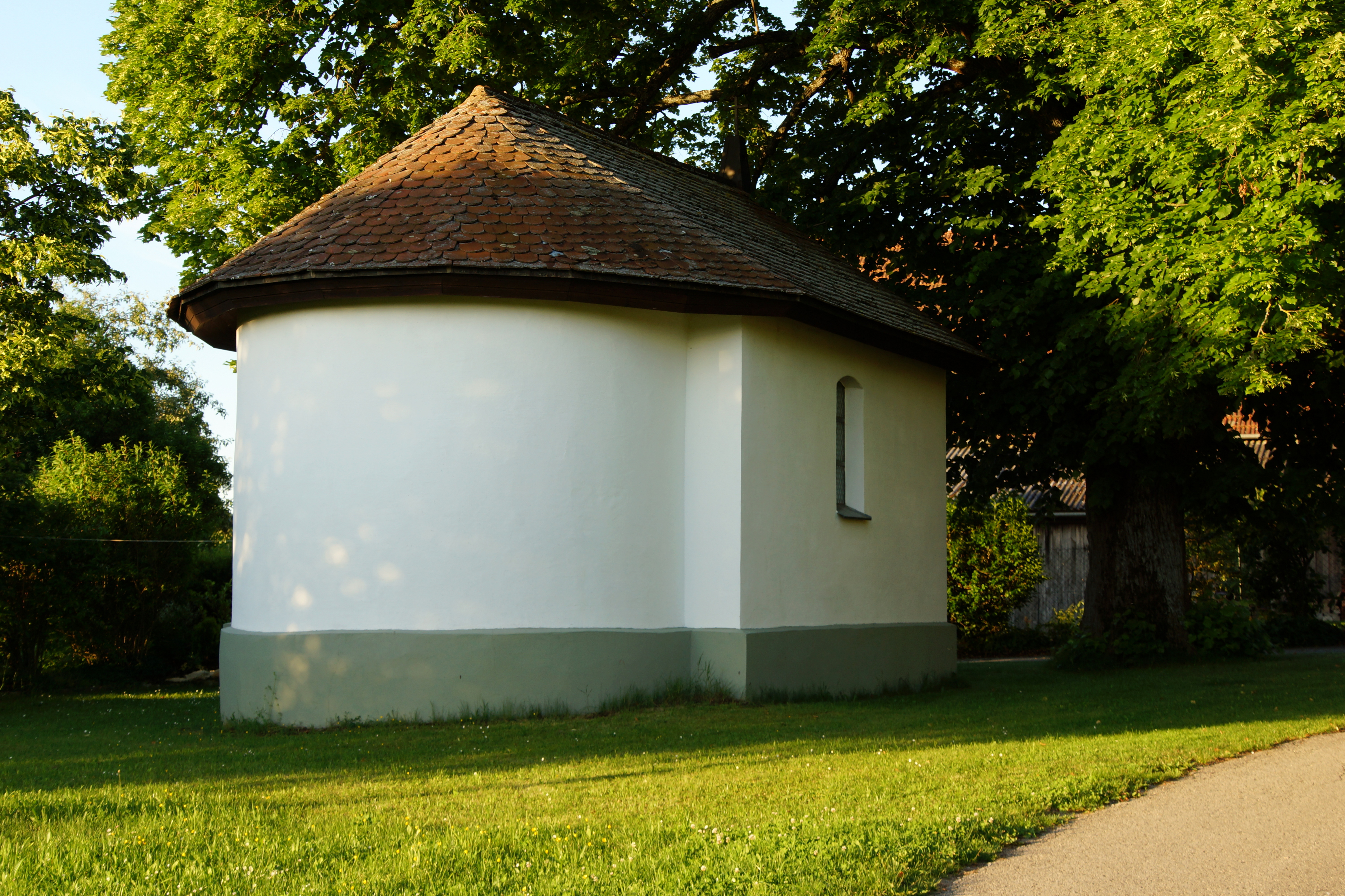 Labersricht unterhalb des Wolfsteins - Neumarkt in der Oberpfalz